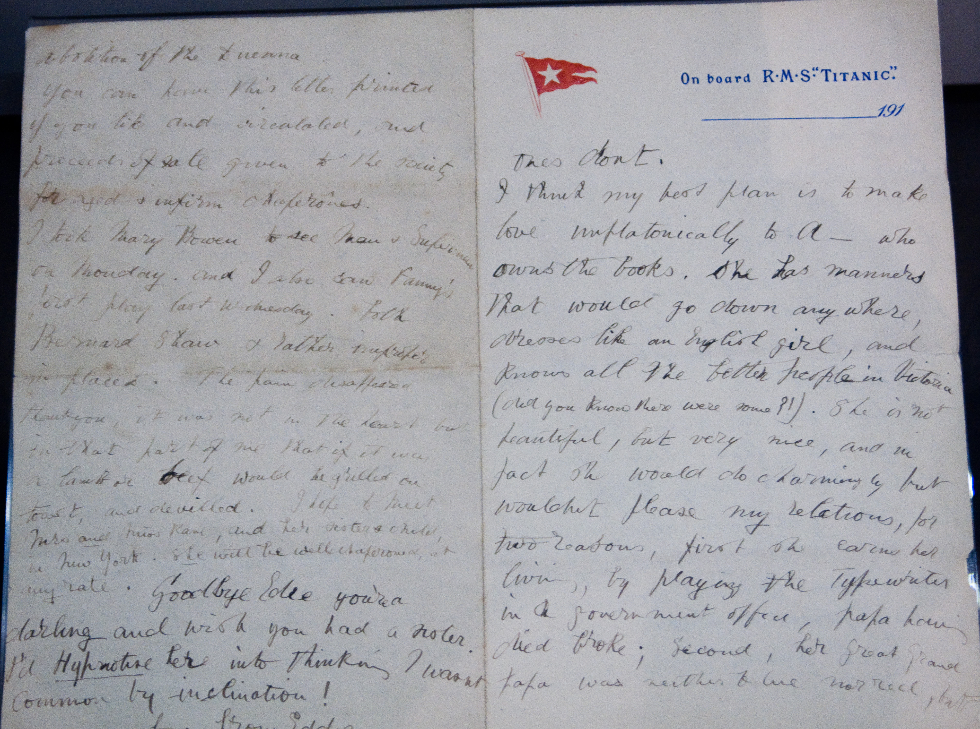 Lettre de Edward Pomeroy Colley adressée à sa belle sœur Edie, posté depuis le RMS Titanic le 11 avril 1912. Musée des lettres et manuscrits, Paris.